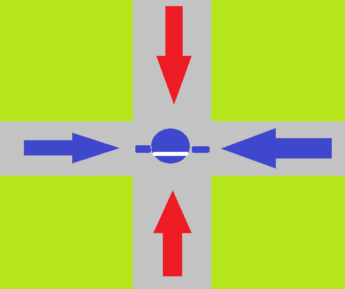 日本の道路交通法による手信号の一例の図